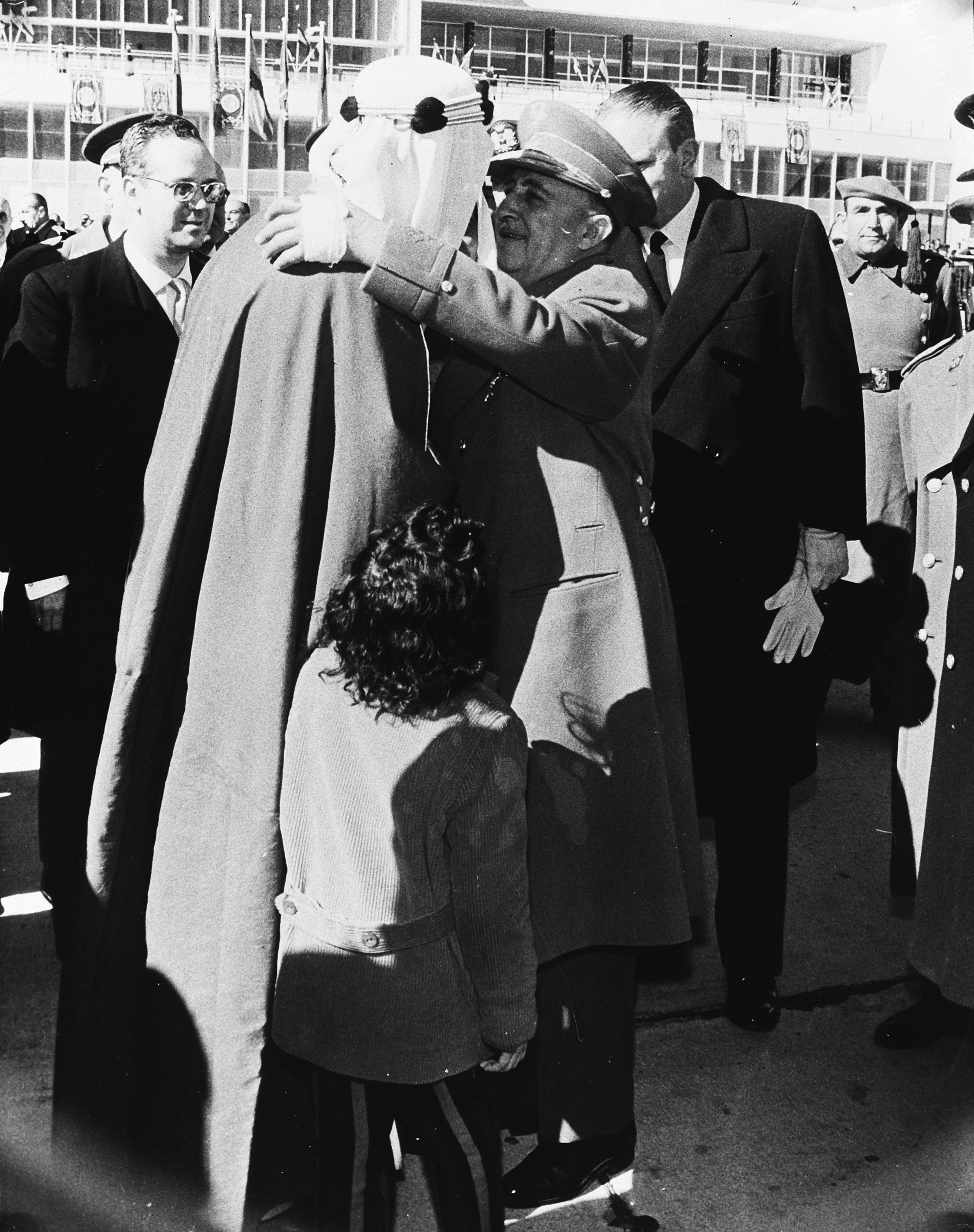 Collectie / Archief : Fotocollectie Anefo Reportage / Serie : [ onbekend ] Beschrijving : Koning Saud Ibu Abdul Assiz bezoekt Madrid. Samen met Franco Datum : 19 februari 1962 Locatie : Madrid, Saoedi-Arabië, Spanje Trefwoorden : bezoeken, dictators, vorstenhuizen Persoonsnaam : Franco Francisco, Saud Ibu Abdul Assiz Fotograaf : [onbekend] Auteursrechthebbende : Nationaal Archief Materiaalsoort : Glasnegatief Nummer archiefinventaris : bekijk toegang 2.24.01.09 Bestanddeelnummer : 913-5403